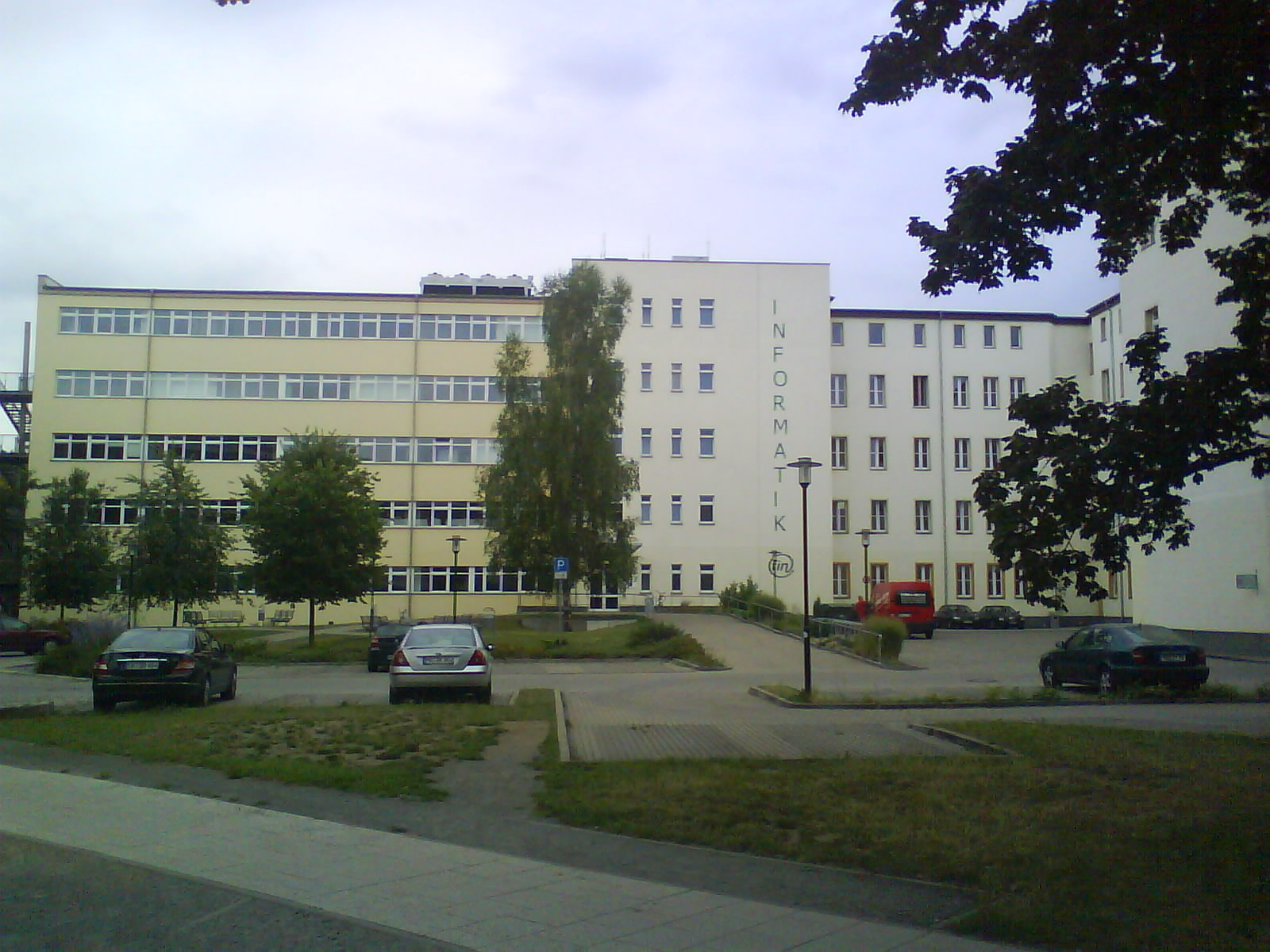 fakultät für informatik der otto-von-guericke-universität